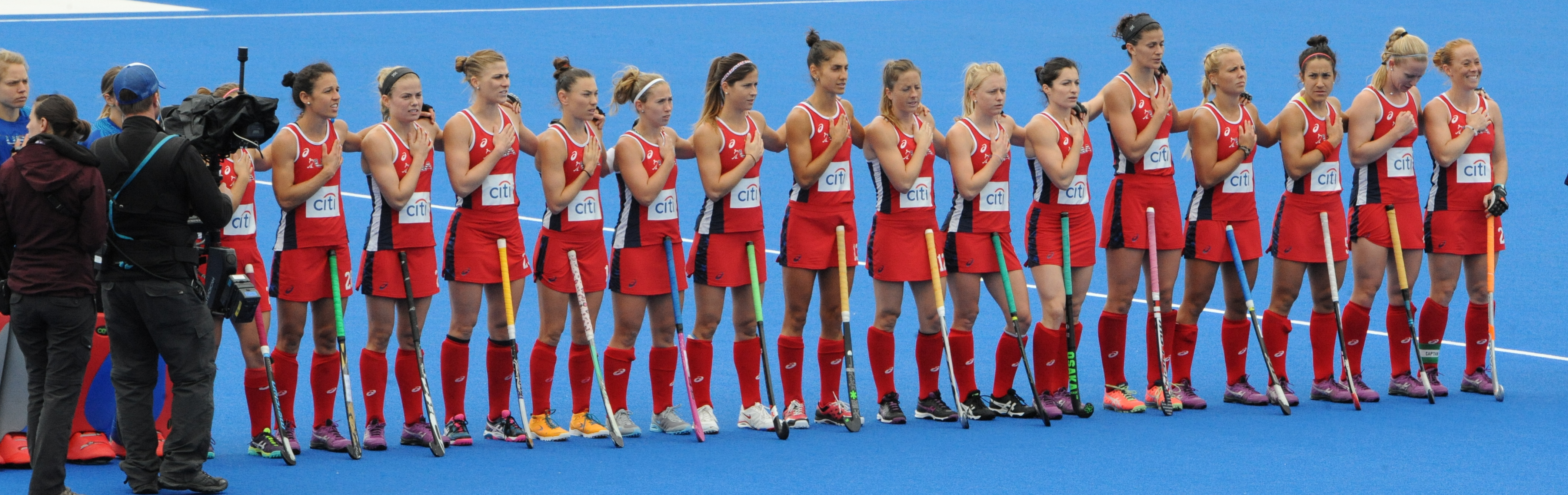 USA v Australia CT 2016